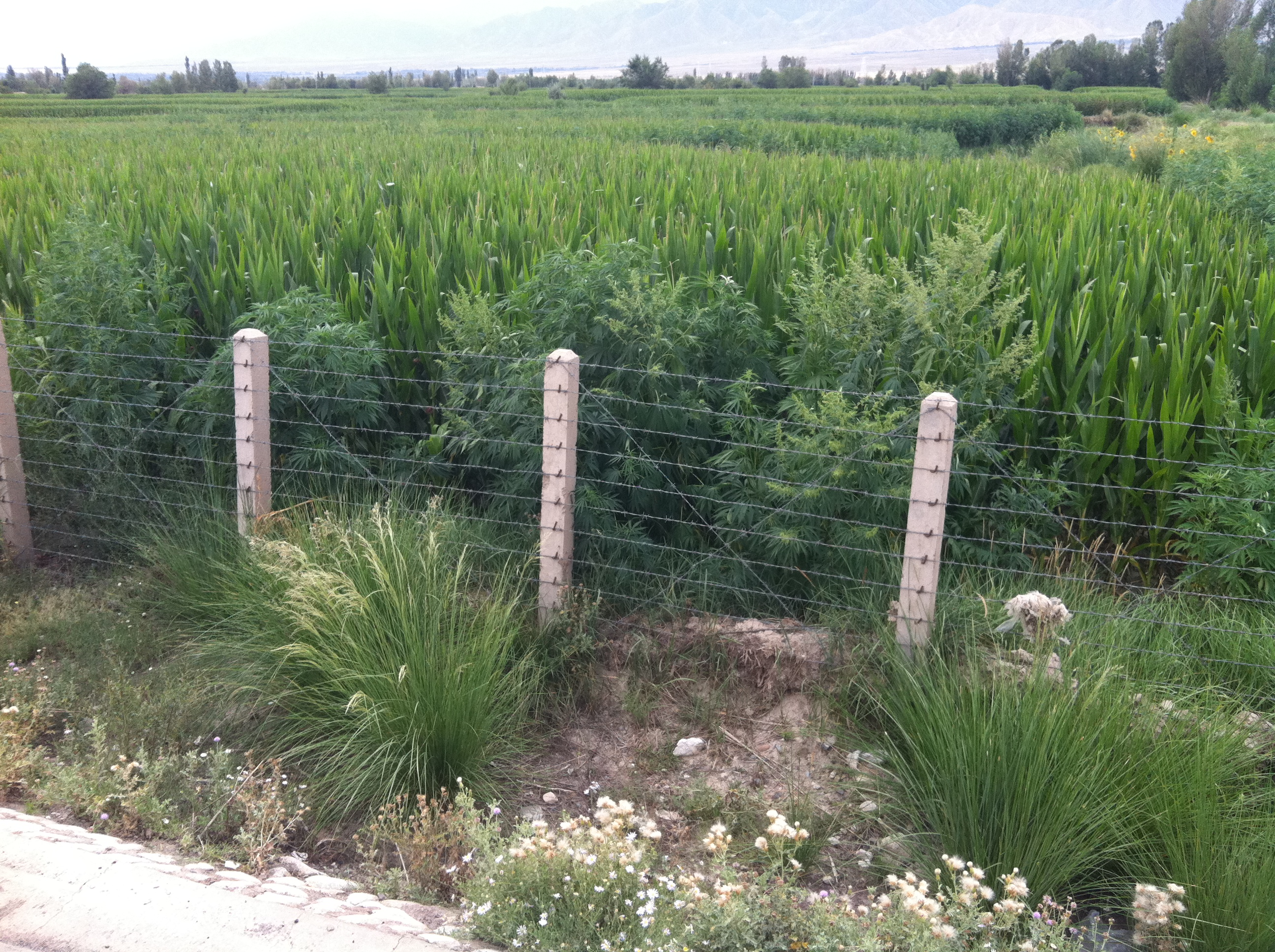 Road-side Marijuana